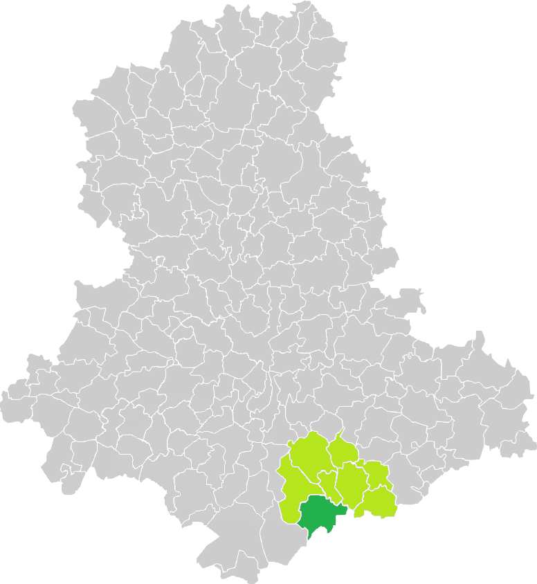 Carte de situation de la commune de Meuzac (en vert foncé) dans le votre Canton (en vert clair) sur une carte des communes de la Haute-Vienne